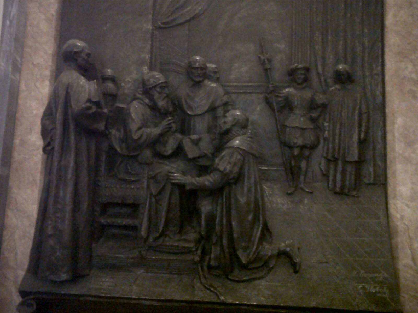 Sant Pau aprova i alaba el llibre de Sant Ignasi, 31 de juliol de 1548.